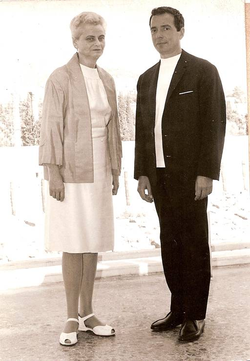 Ο Γιώργος Μάνεσης με την Alice Pashkus μπροστά από την Ακρόπολη (Αθήνα, δεκαετία 1960).